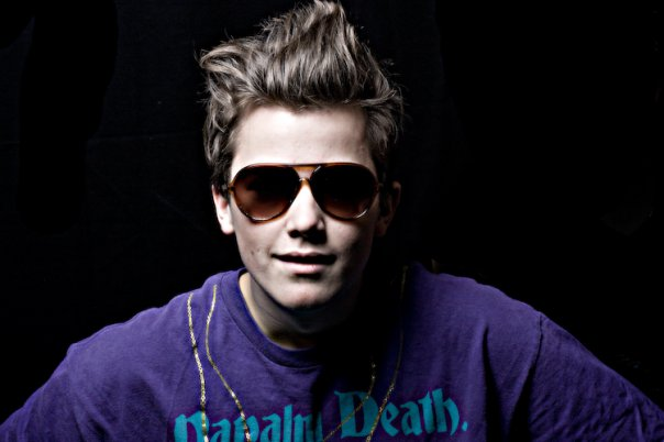 Fotograf Mathias Blix